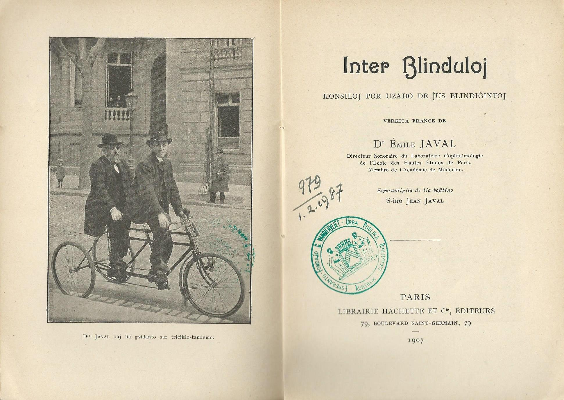 librokovrilo de "Inter Blinduloj", 1907